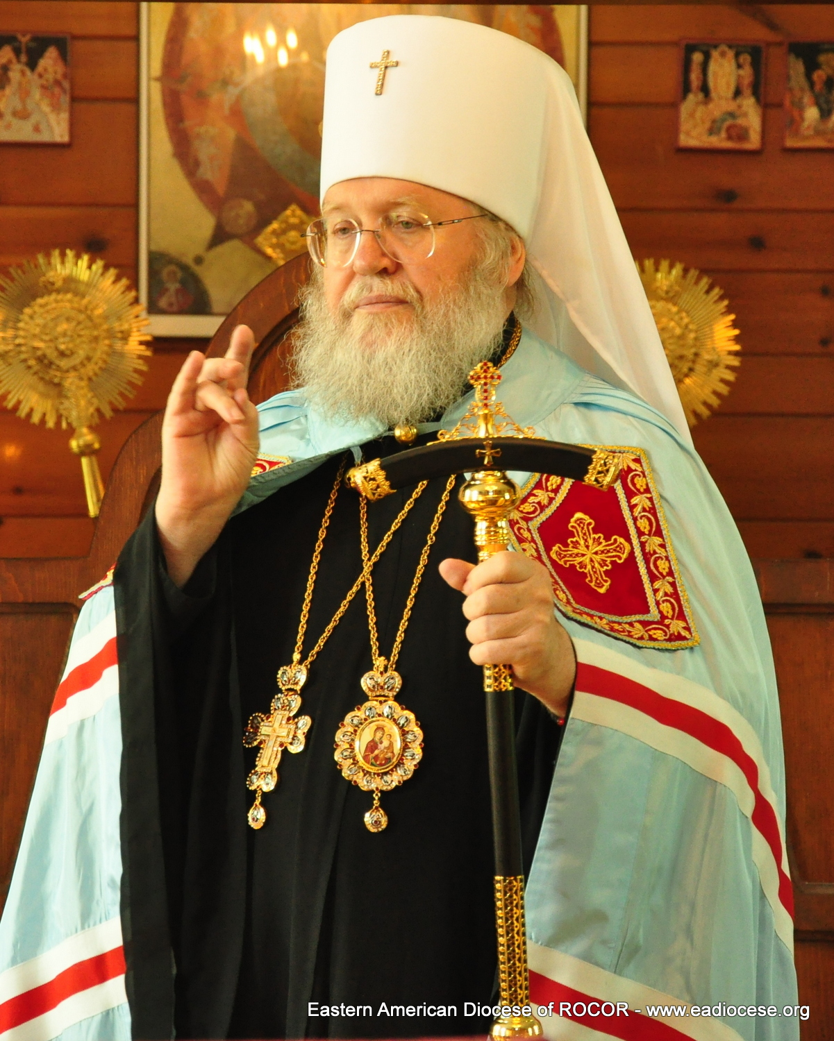 Преосвященійший Іларіон (в миру Ігор Олексійович Капрал) - Митрополит Східно-Американский і Нью-Йоркський, Першоієрарх РПЦЗ (Російської Православної Церкви за кордоном), батьки якого народилися у селі Обенижі.